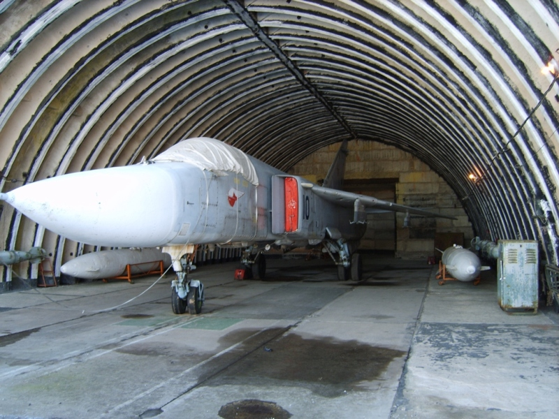 Су-24 в арочном укрытии, аэродром Сиверский